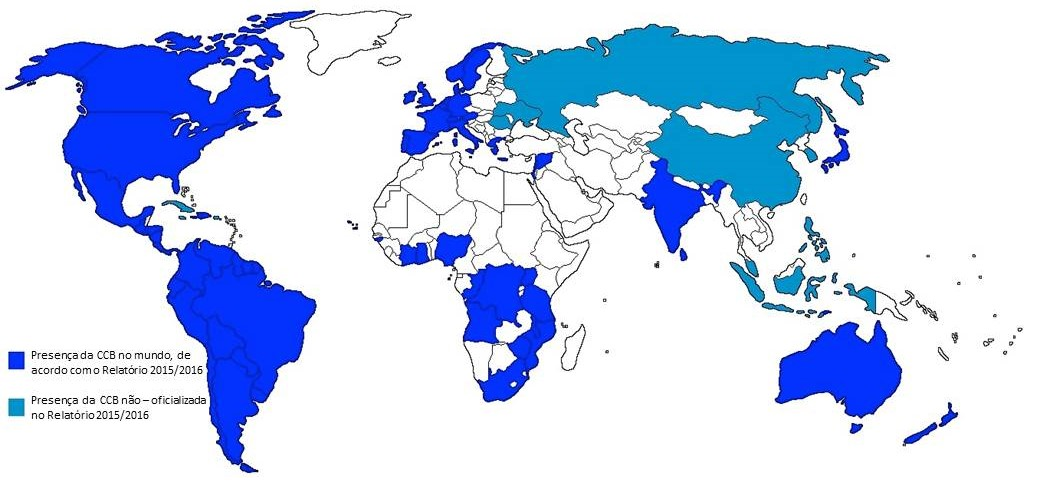 Mapa Mundi: Presença da Congregação Cristã no Mundo